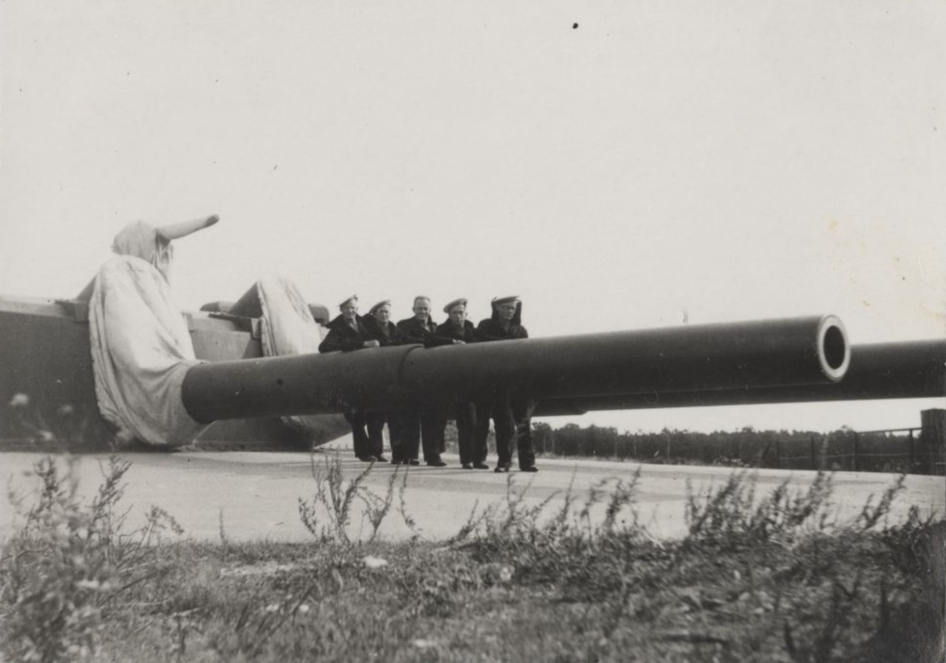 12-tolliste kahuritega Aegna saare rannakaitsepatarei nr 1 1934. aastal